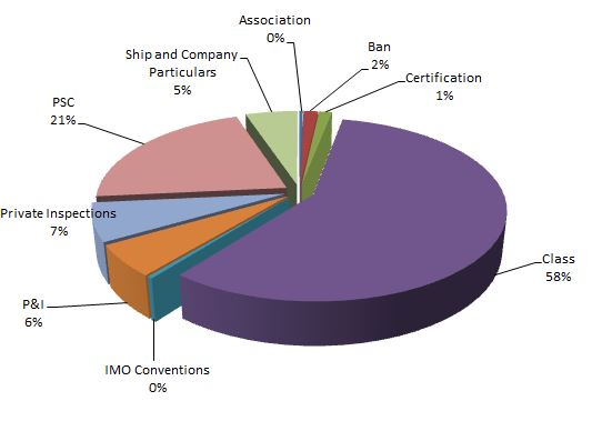 relevé de mise des mises à jours selon le type d'information